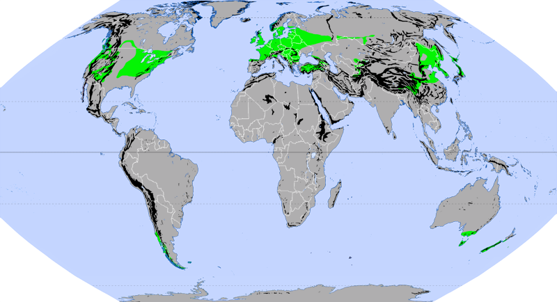 Auszug der Karte Ökozonen nach Jürgen Schultz